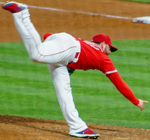 Angels vs Mariners 2019-6-8 Anaheim Stadium